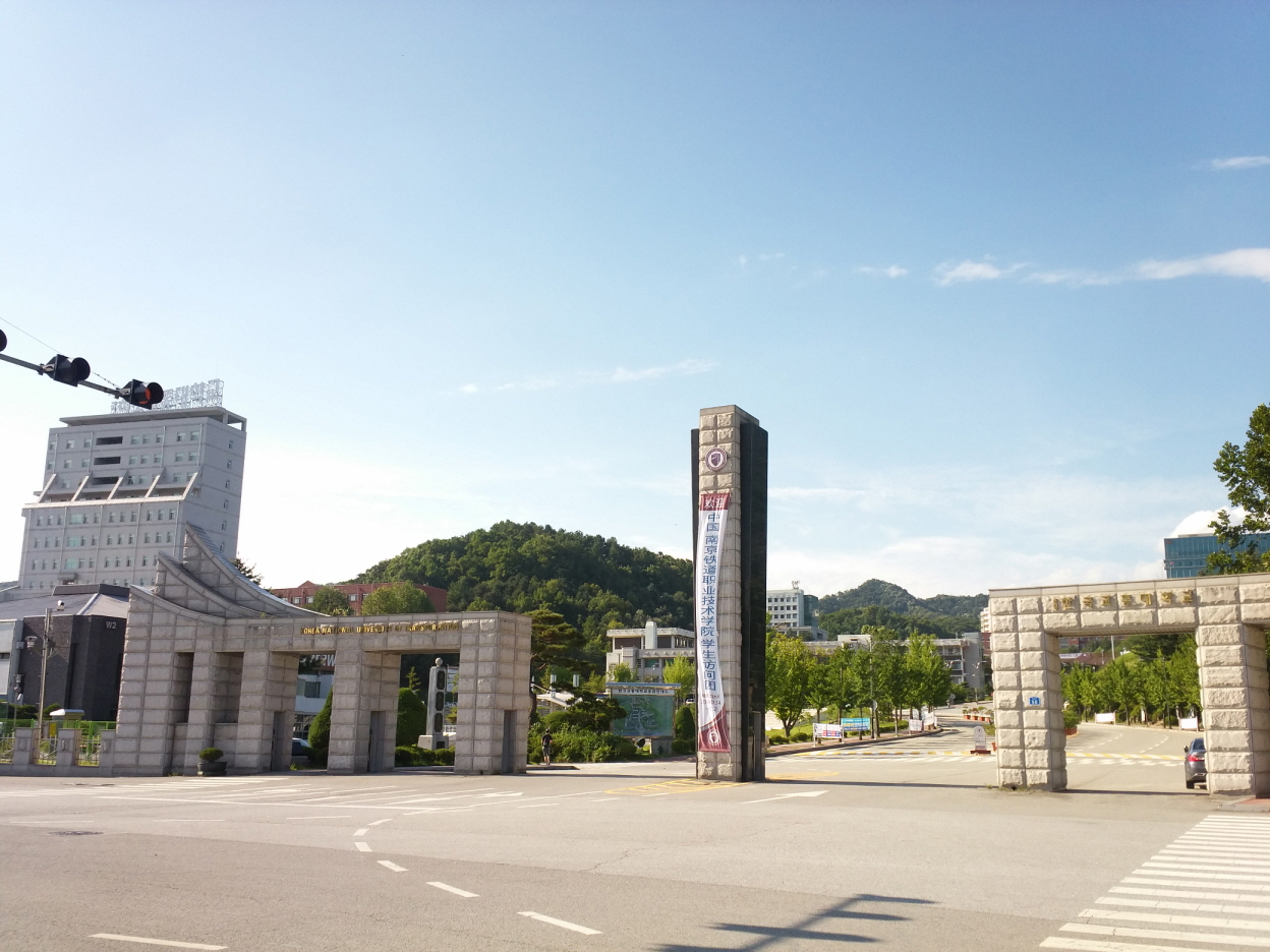 한국교통대학교 정문